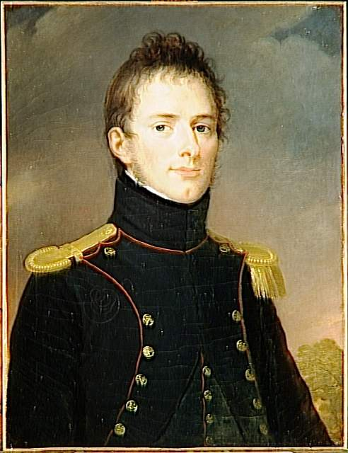 Commandé par Louis-Philippe pour le musée historique de Versailles en 1835 ; esquisse dans la collection du duc de Trévise en 1937 ; autre version au musée de Minneapolis